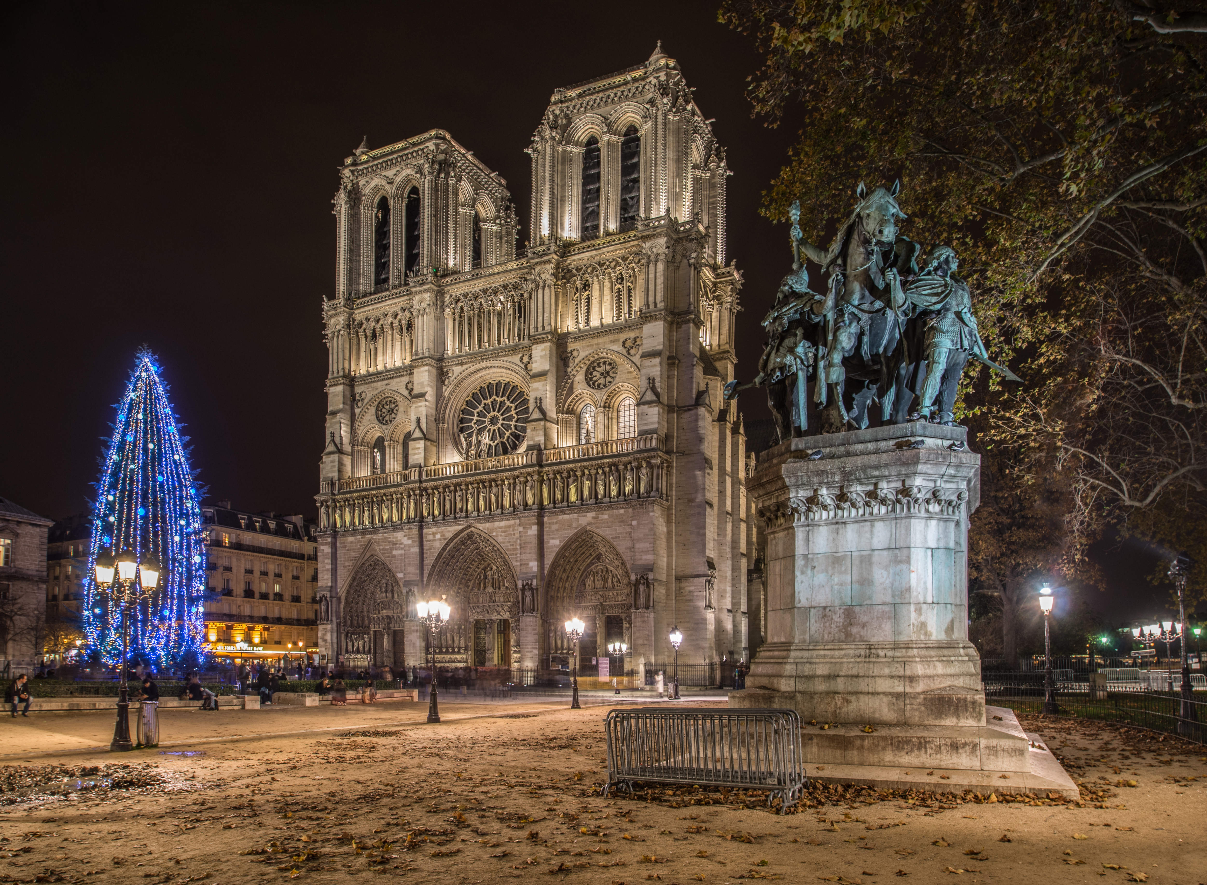 Cathédrale Notre-Dame .